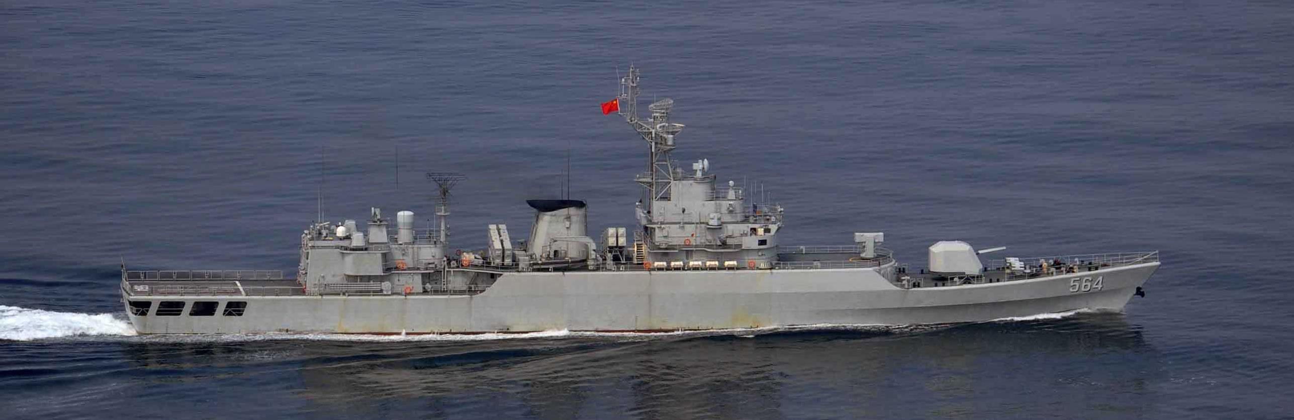 ８月１８日（日）午後７時頃、第３ミサイル艇隊所属「おおたか」（佐世保） 及び第１航空群所属Ｐ－１（鹿屋）が、下対馬の南西約２００ｋｍの海域を北東進するジャンカイⅡ級フリゲート１隻及びジャンウェイⅡ級フリゲート１隻の計２隻を確認した。 その後、これらの艦艇が対馬海峡を北上し、日本海へ進出したことを確認した。